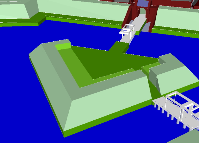 Nedersaksies: Raveliene.jpg